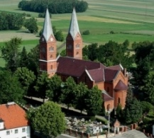 Kościół św. Mikołaja i św. Małgorzaty w Wysokiej